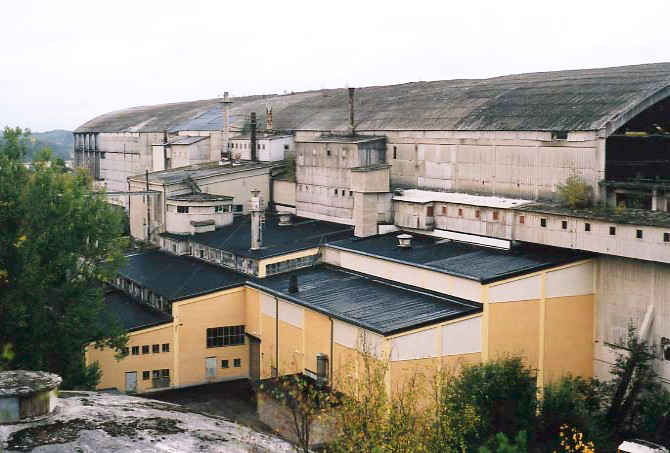 Stora Vika, cementfabriken hösten 2002. Lagerbyggnad och kvarnhus (med gul fasad).